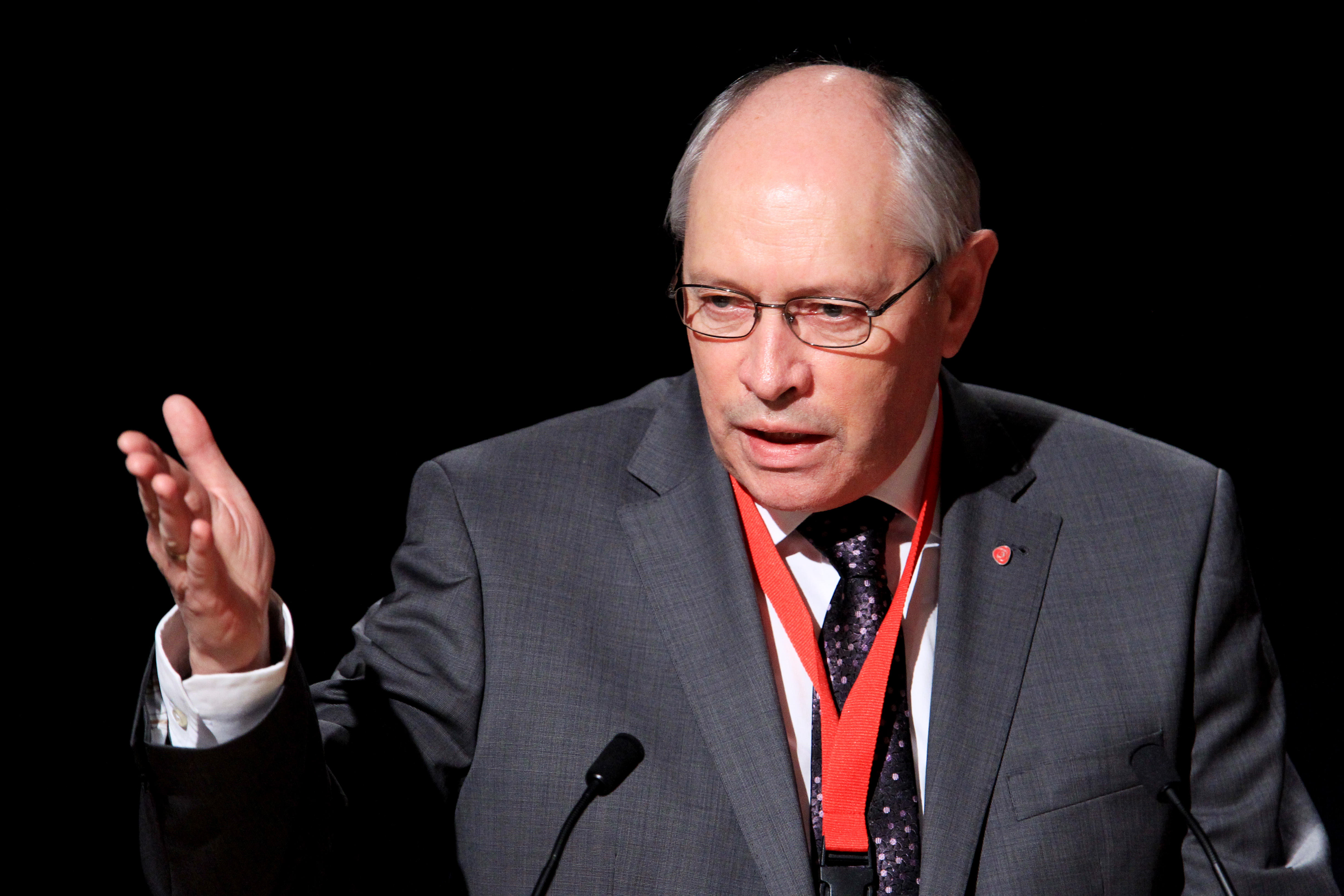 Martin Kolberg vid Nordiska Rådets session i Reykjavik. 2010-11-03.